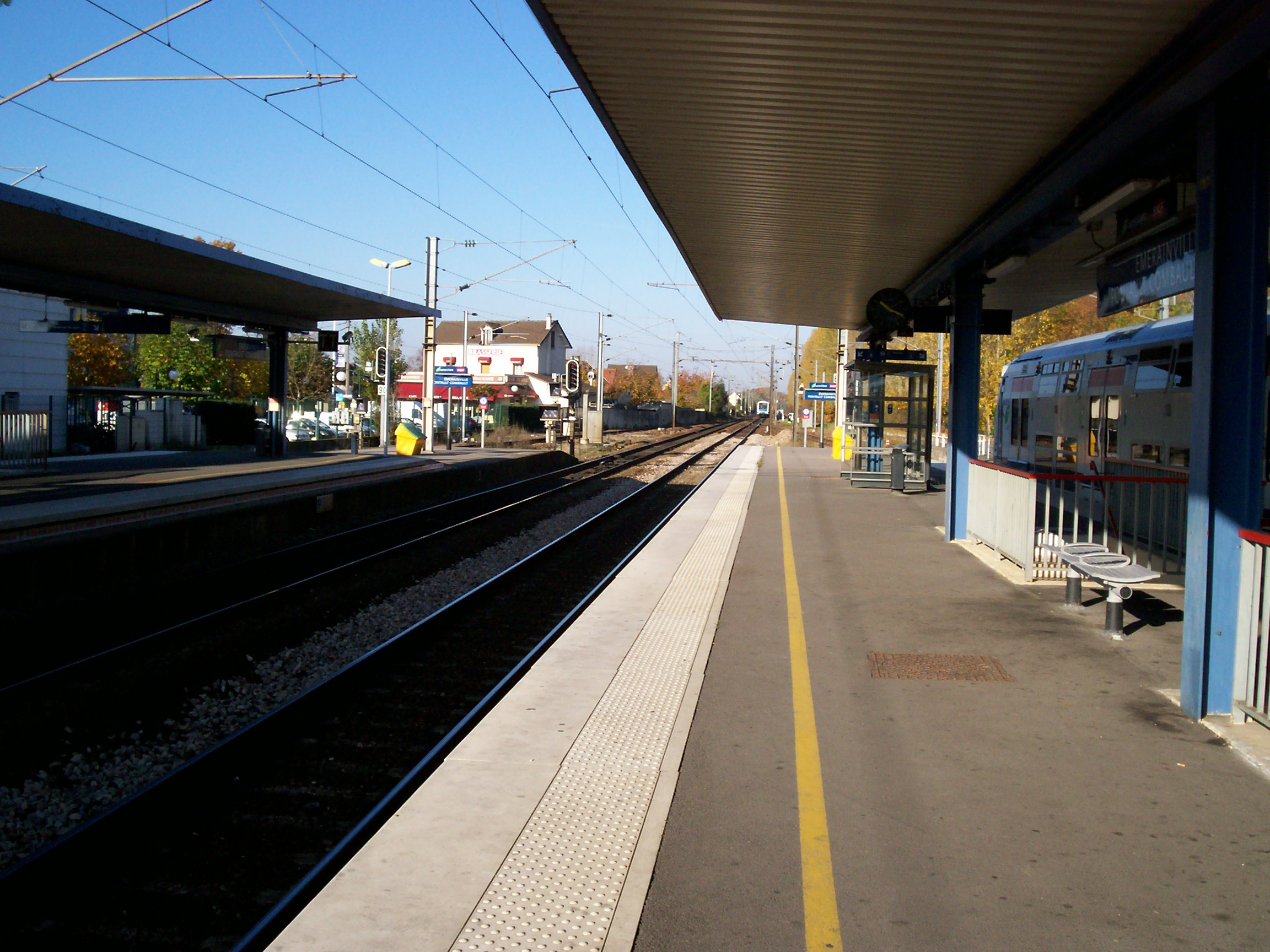 Gare d'Emerainville Pontault-Combault